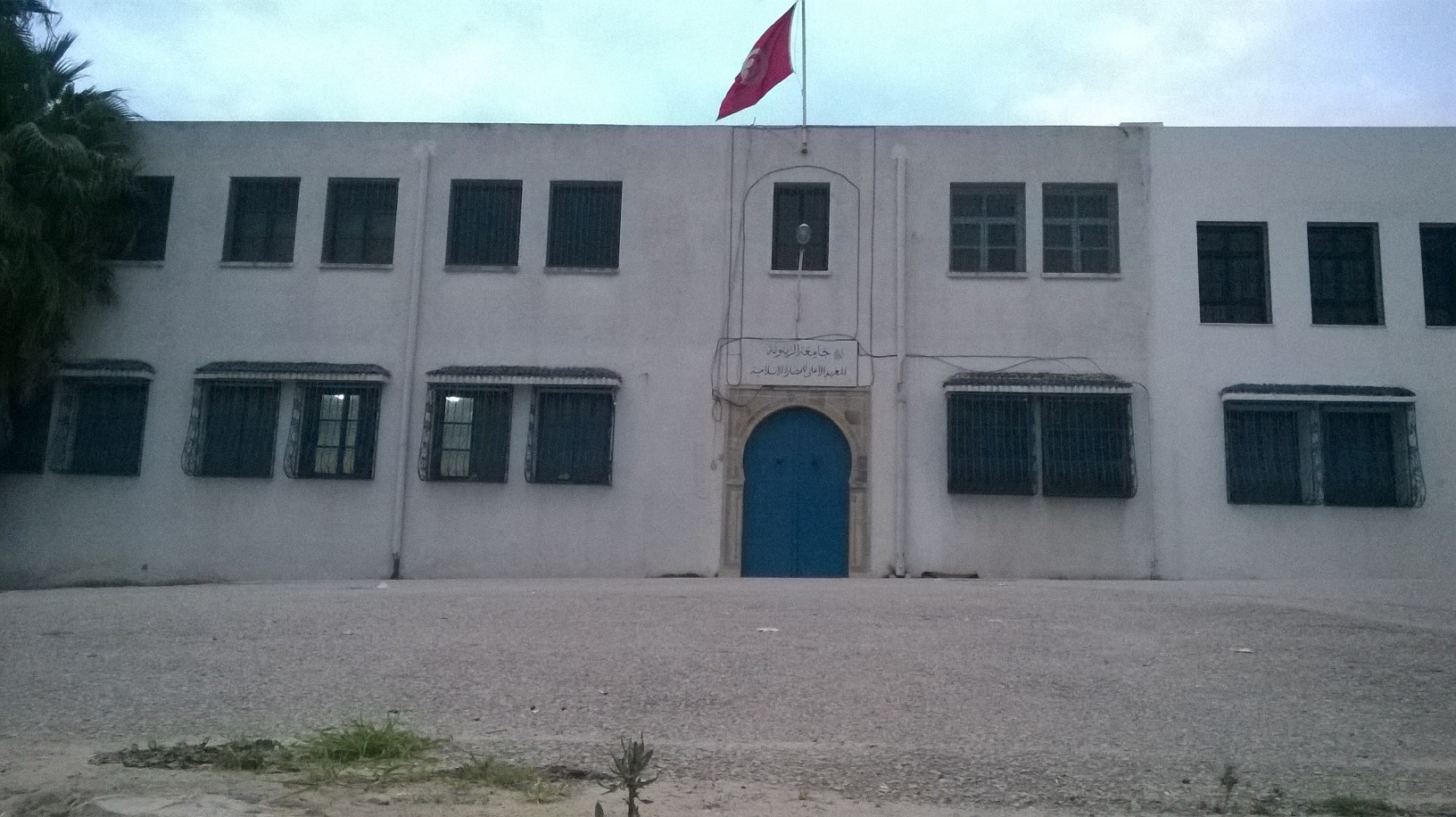 Bab Sidi Kacem, la médina de Tunis باب سيدي قاسم الجليزي ، مدينة تونس العتيقة